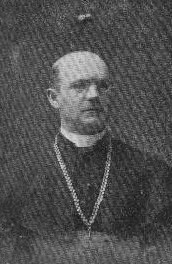 Adolf Šelbický (1869 -1959), Český římskokatolický kněz.